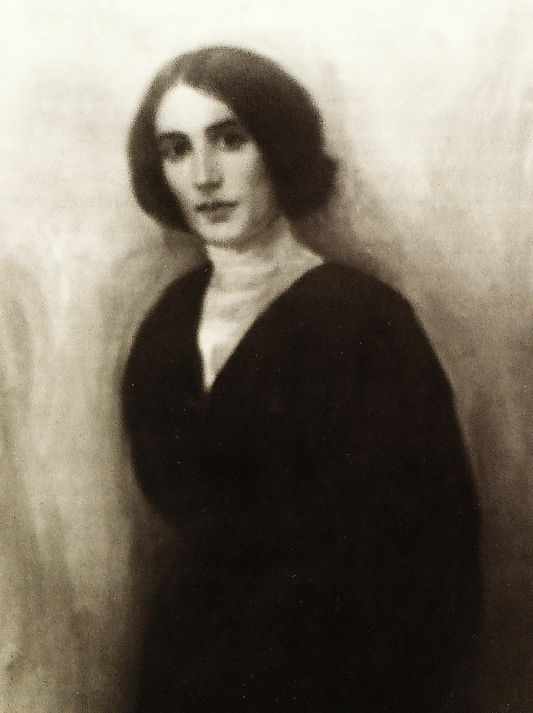 Школьник, Мария Марковна